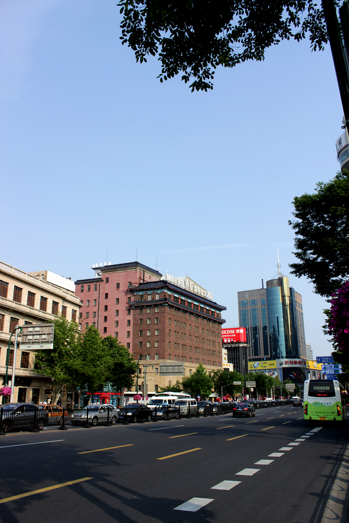 中文（中国大陆）: 八仙桥基督教青年会大楼